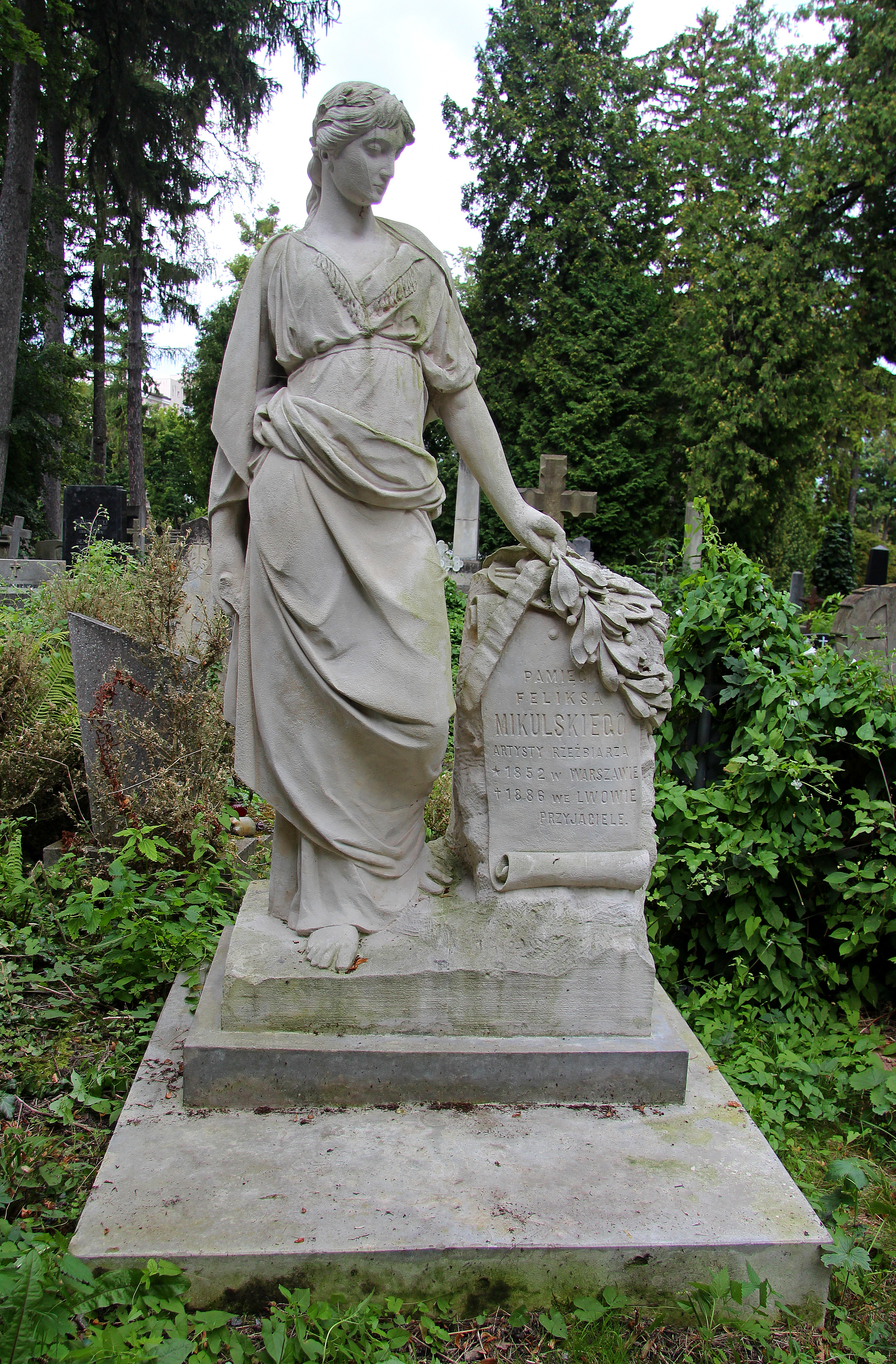 Відреставрований надгробок на могилі Ф. Мікульського.Личаківський цвинтар , поле № 69.